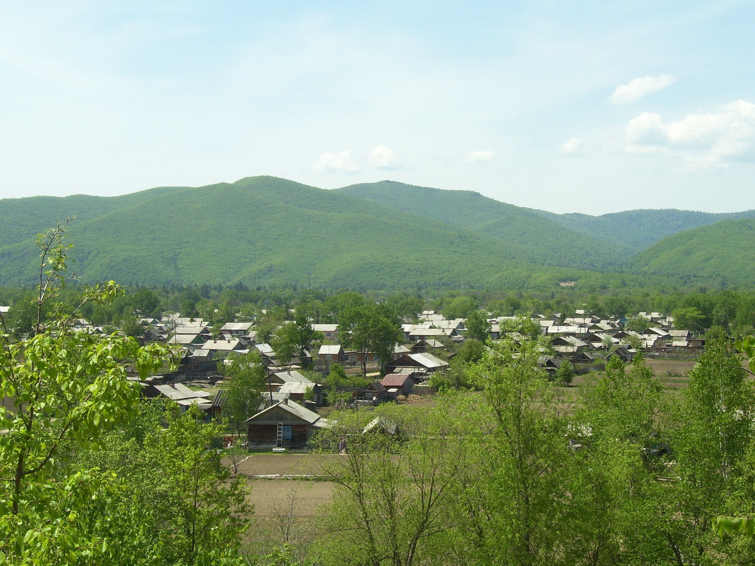 с. Шумное - вид с высоты птичьего полета